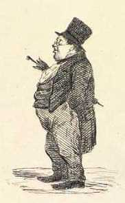 Simon Sørensen Meisling (06.Oct.1787-08.Apr.1856), dansk filolog og skolemand